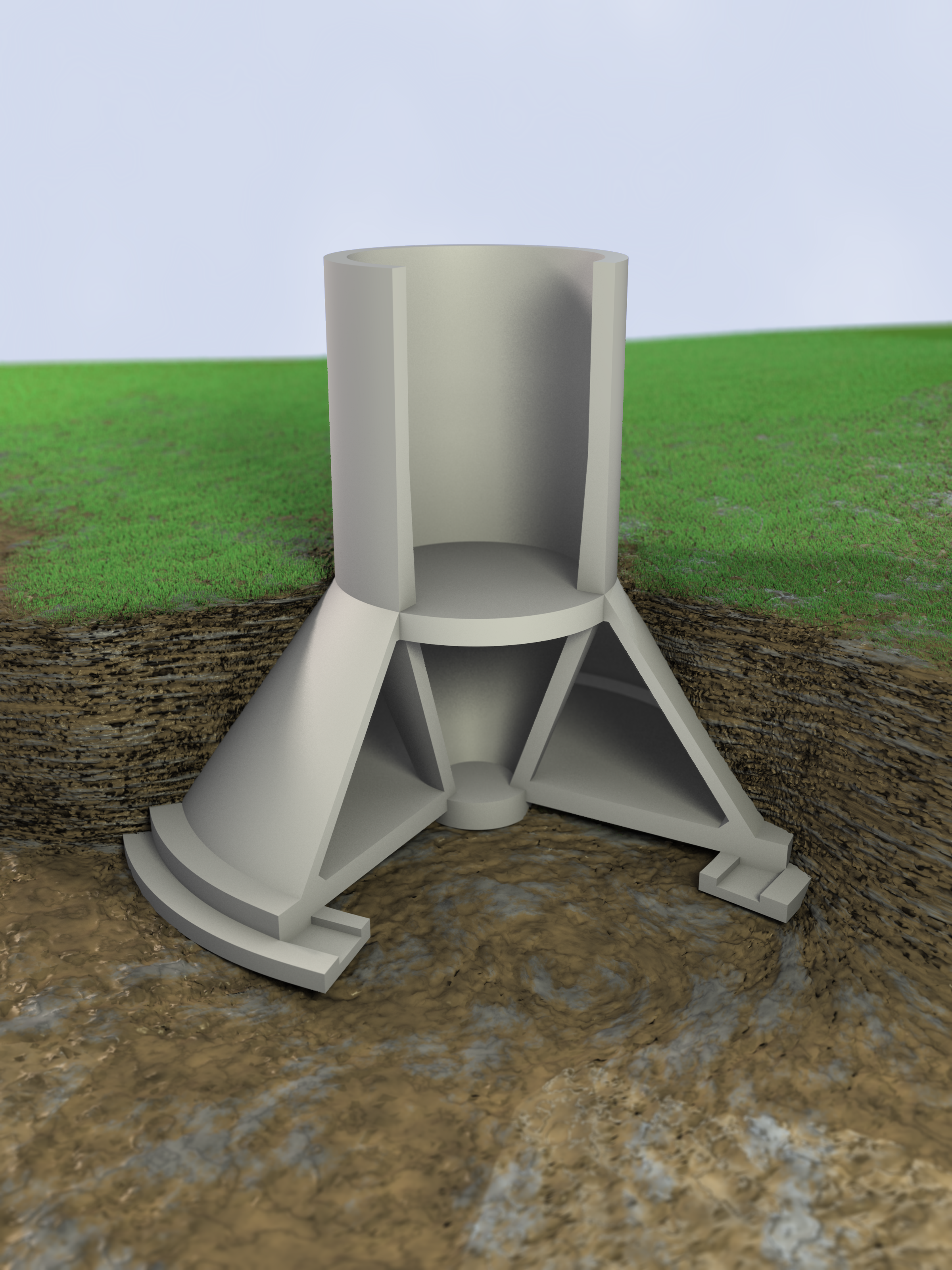 Modell des Fundamentfußes des Stuttgarter Fernsehturms ohne Beschriftung